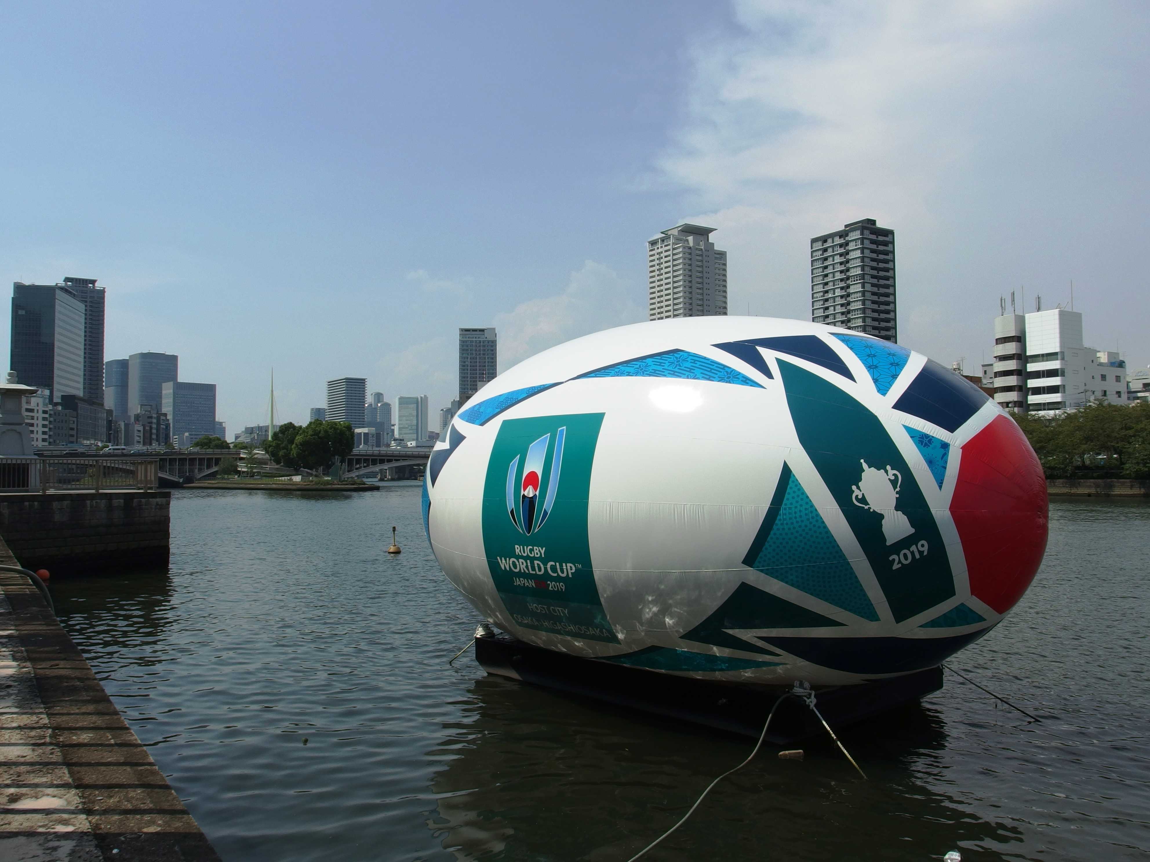 大阪市の八軒家船着場。